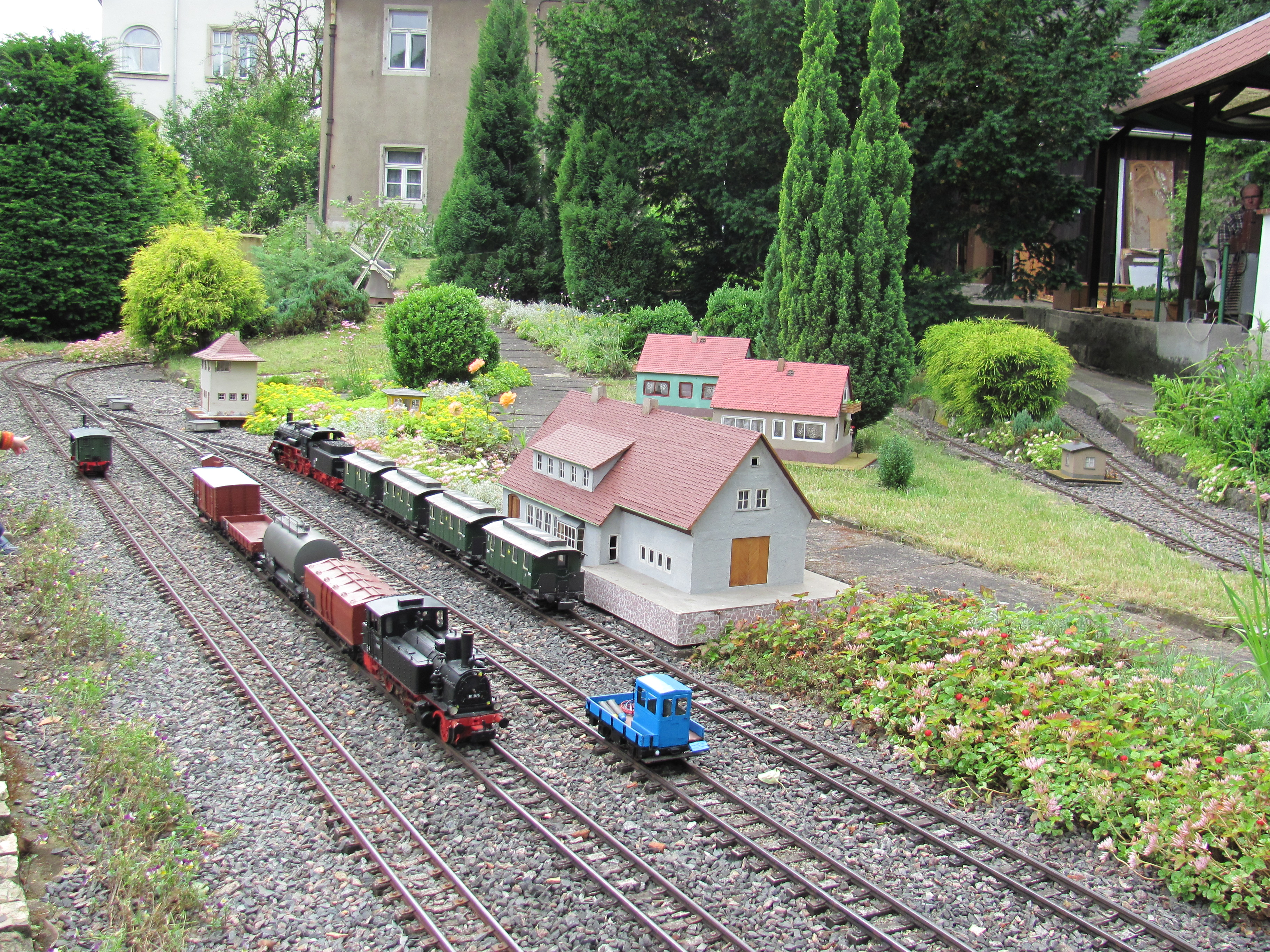 Radebeul, Gartenbahnschau im Vorgarten von Haus Fährmann